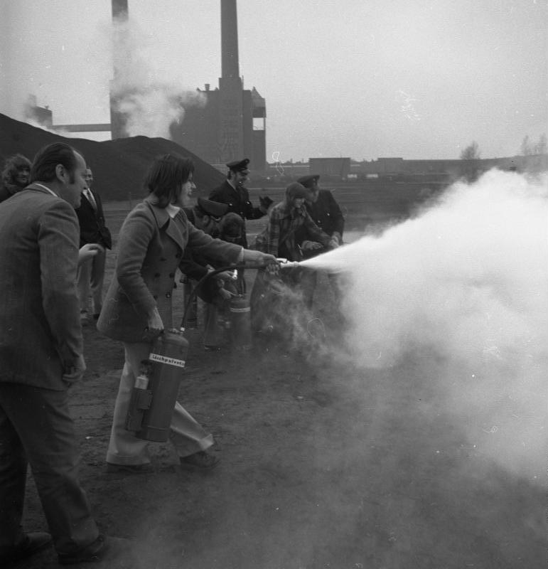 VW-Werk, Wolfsburg Feuerlöschlehrgänge